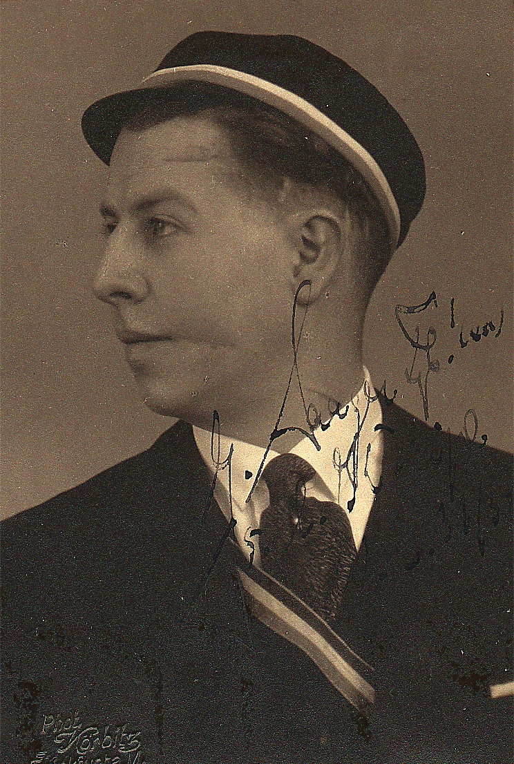 Fotografie von Gerhard Saager (1910–1992) als aktivem Angehörigen des Corps Austria